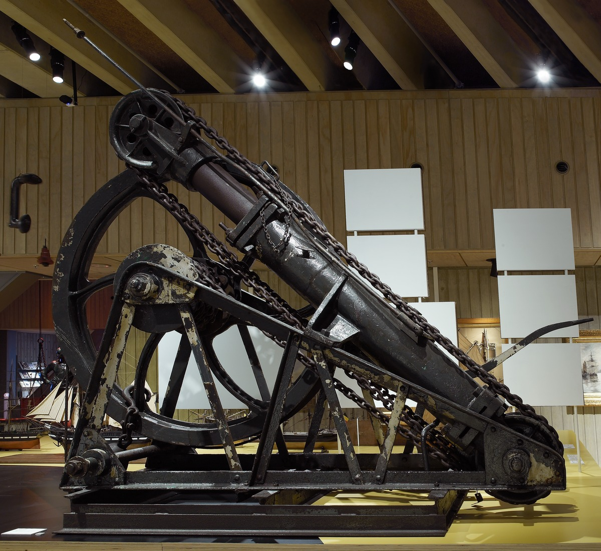 hydraulische jigger, William Armstrong, ca 1888, MAS